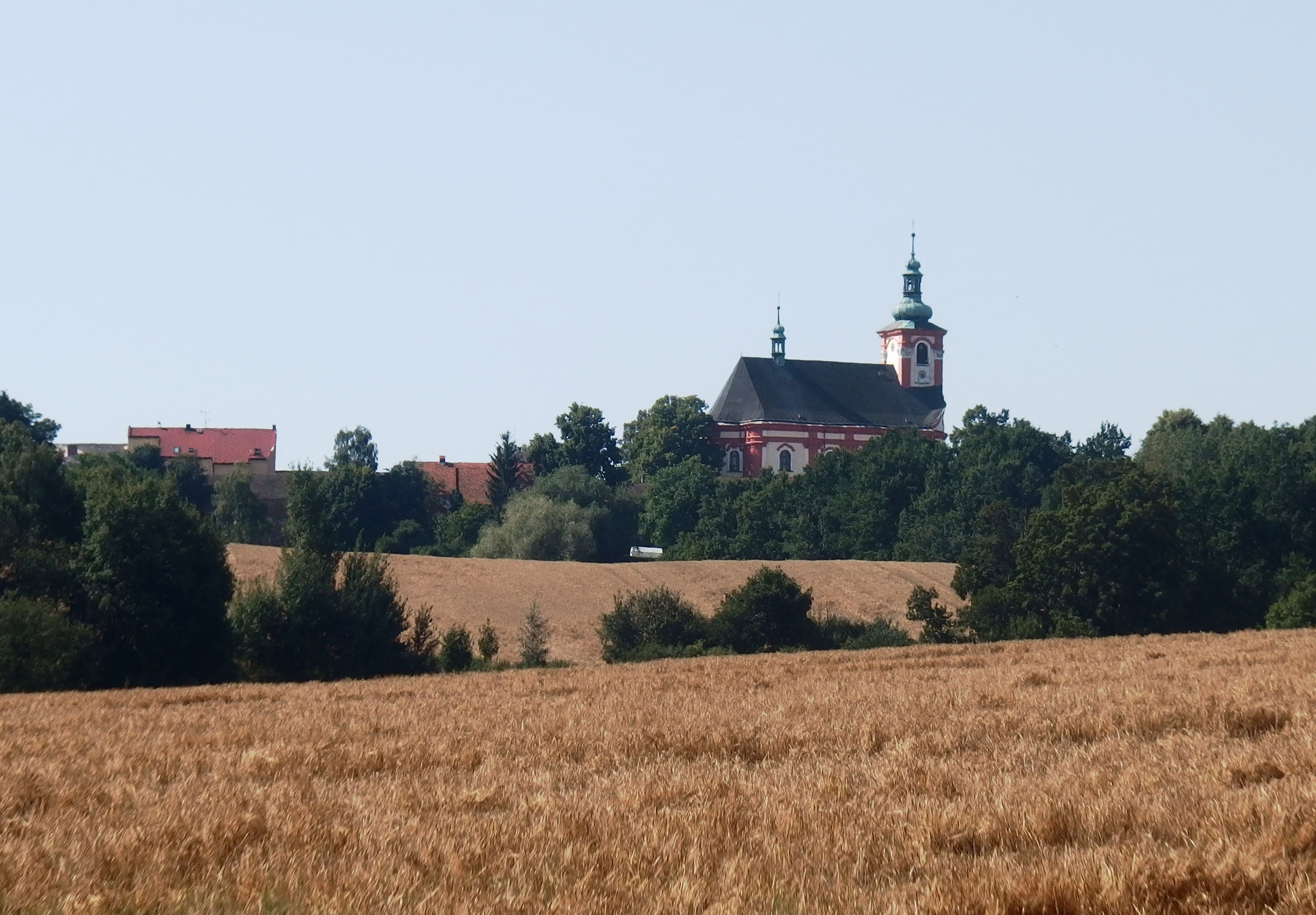 Kostel svatého Jana Křtitele, náves, Křenov (okres Svitavy).